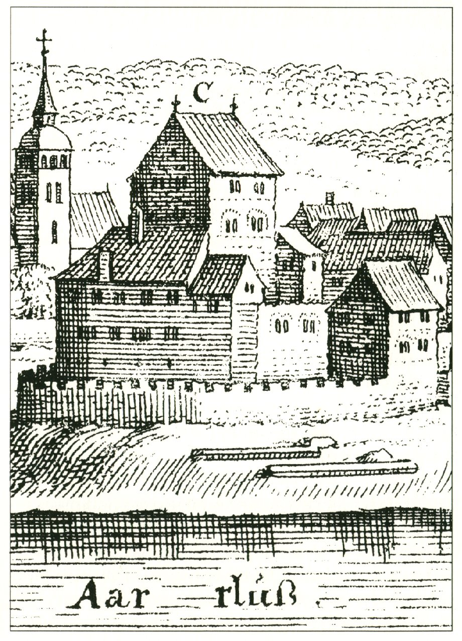 Schloss Klingnau Die frühste bekannte Darstellung